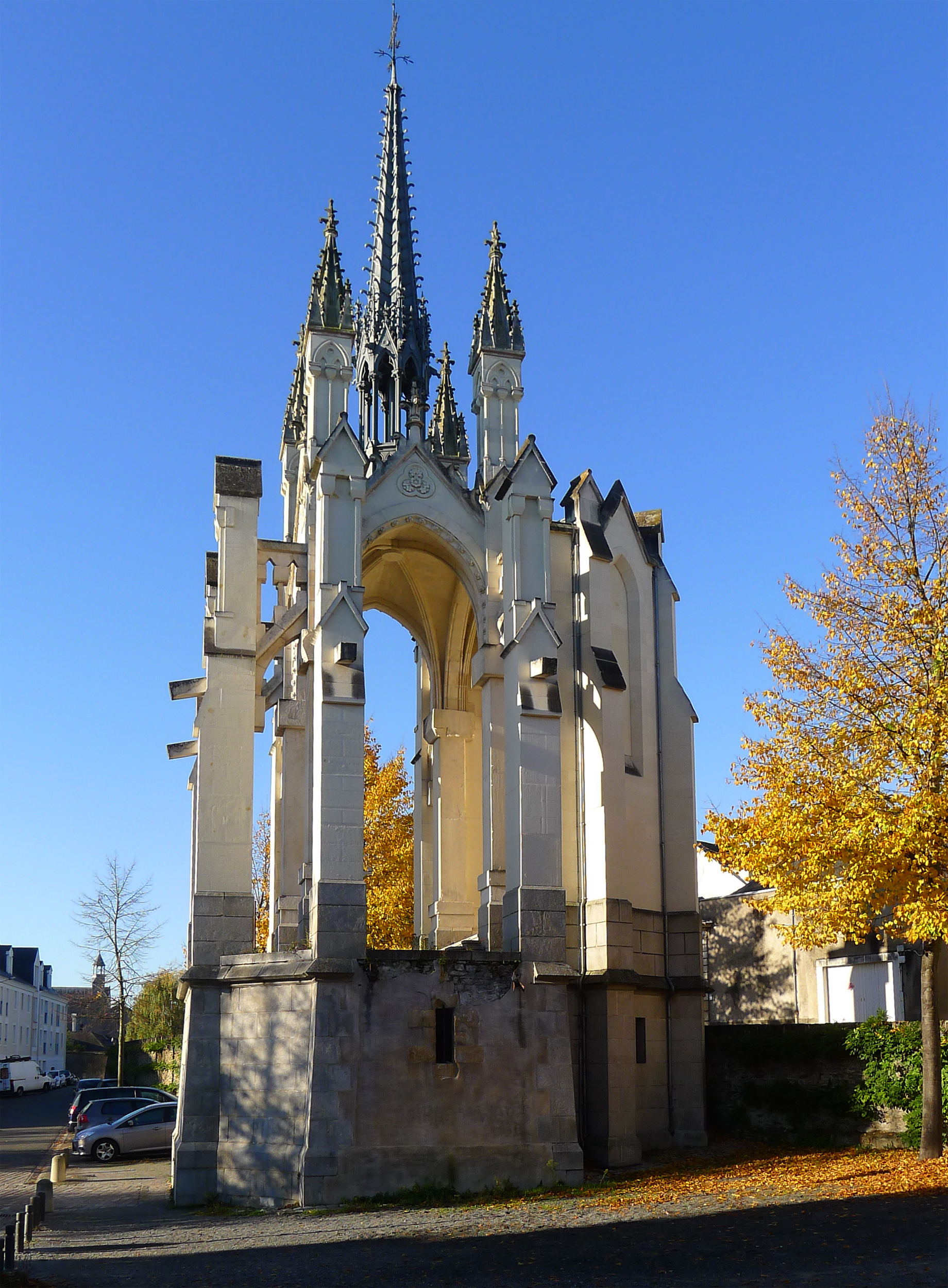 Reposoir du tertre Saint-Laurent (oratoire d'Angers) - Maine-et-Loire, France This building is indexed in the Base Mérimée, a database of architectural heritage maintained by the French Ministry of Culture, under the references PA00108941 and IA49000786 .